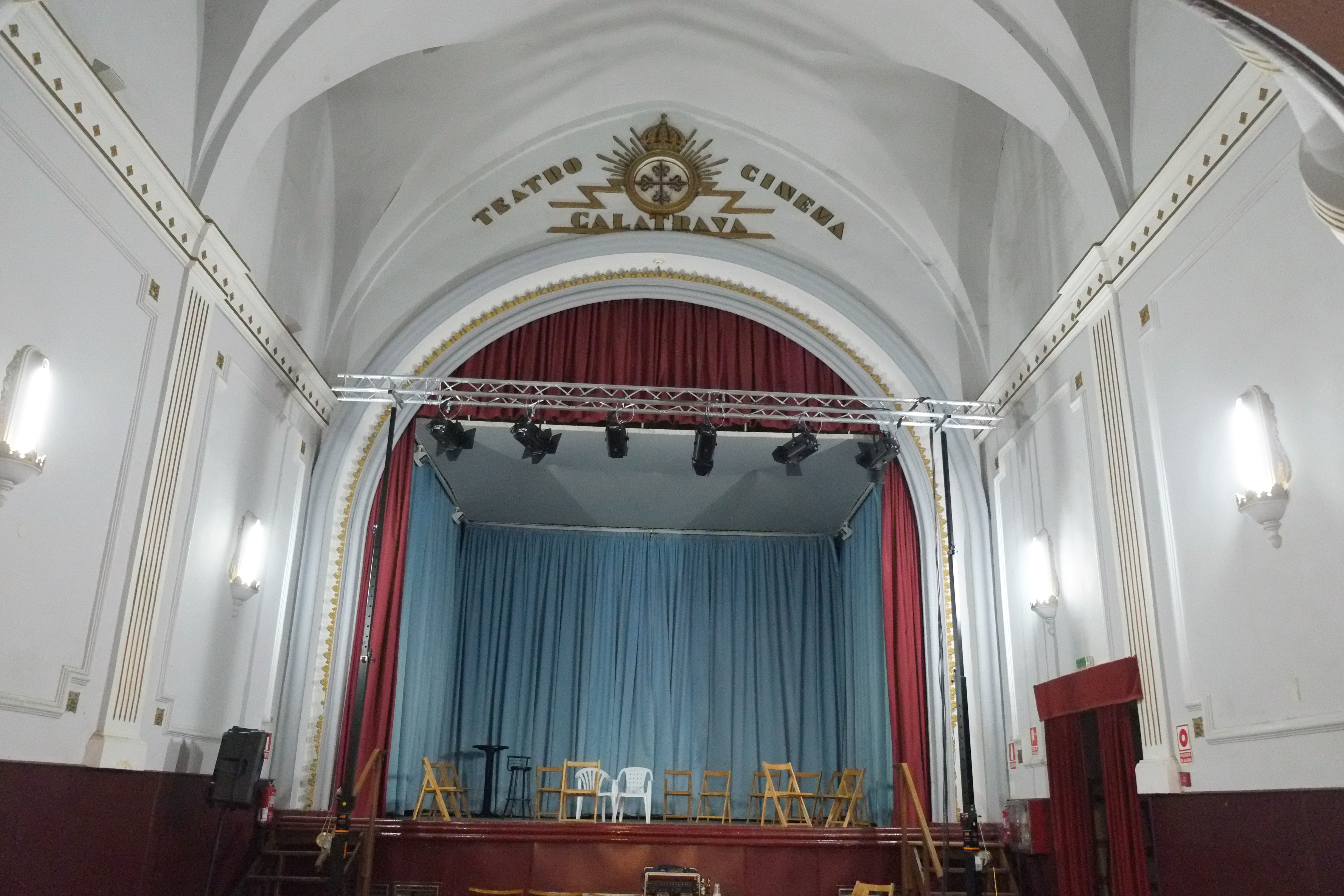 Cinema Calatrava in Fitero in Navarra (Spanien)